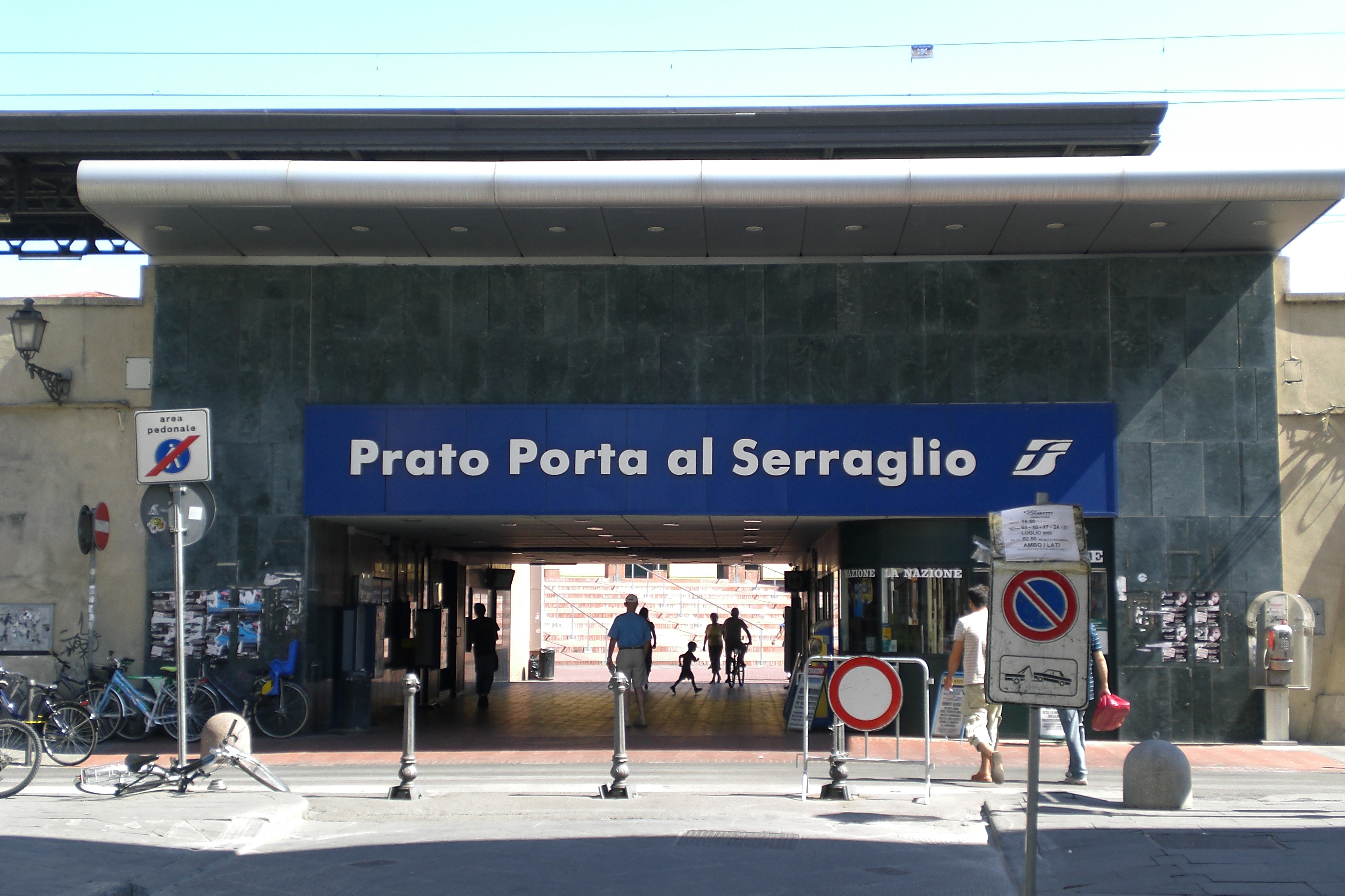 Stazione di Prato Porta al Serraglio